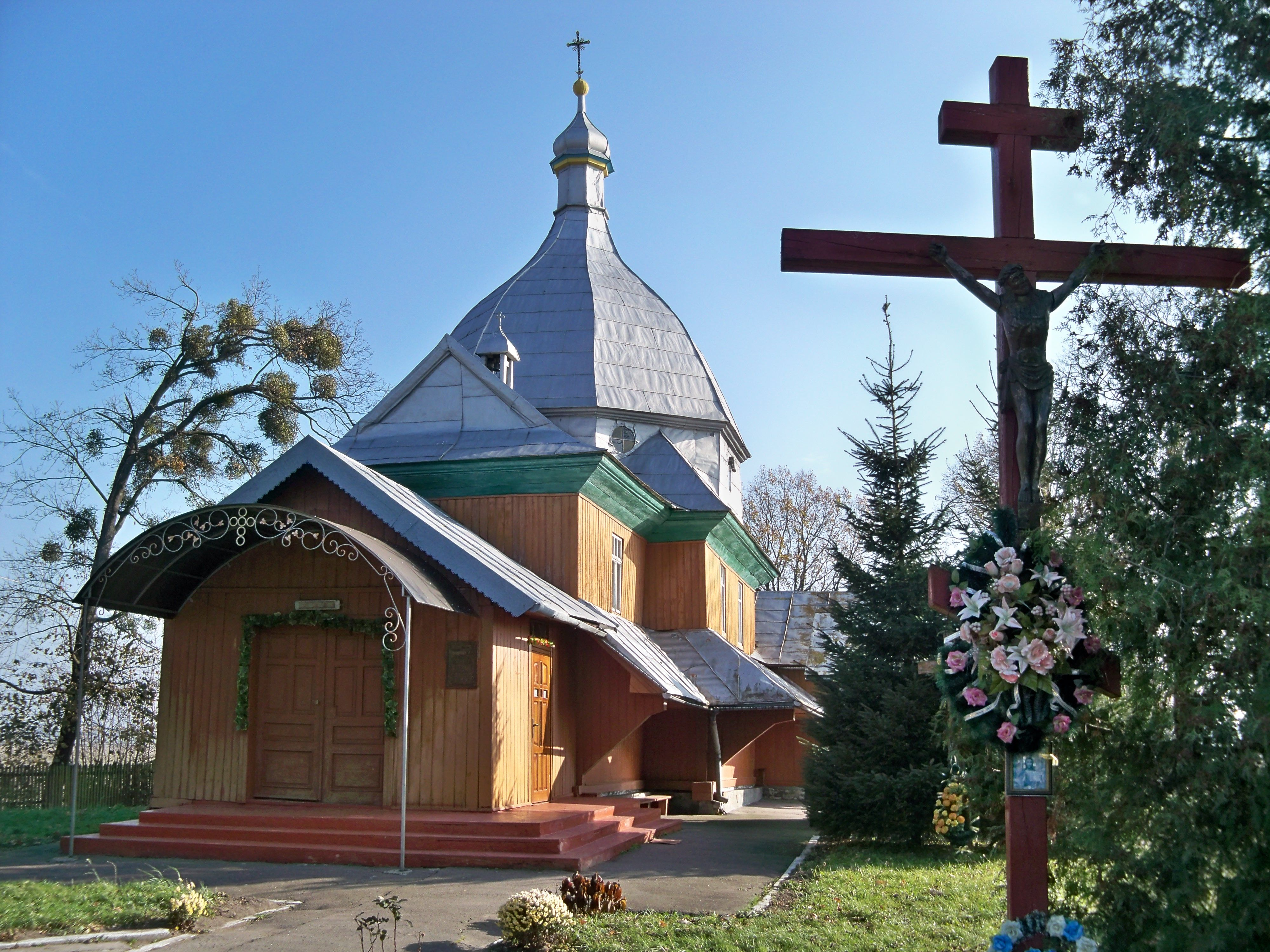 Церква Св.Преображення Господнього /дер./, с.Волиця